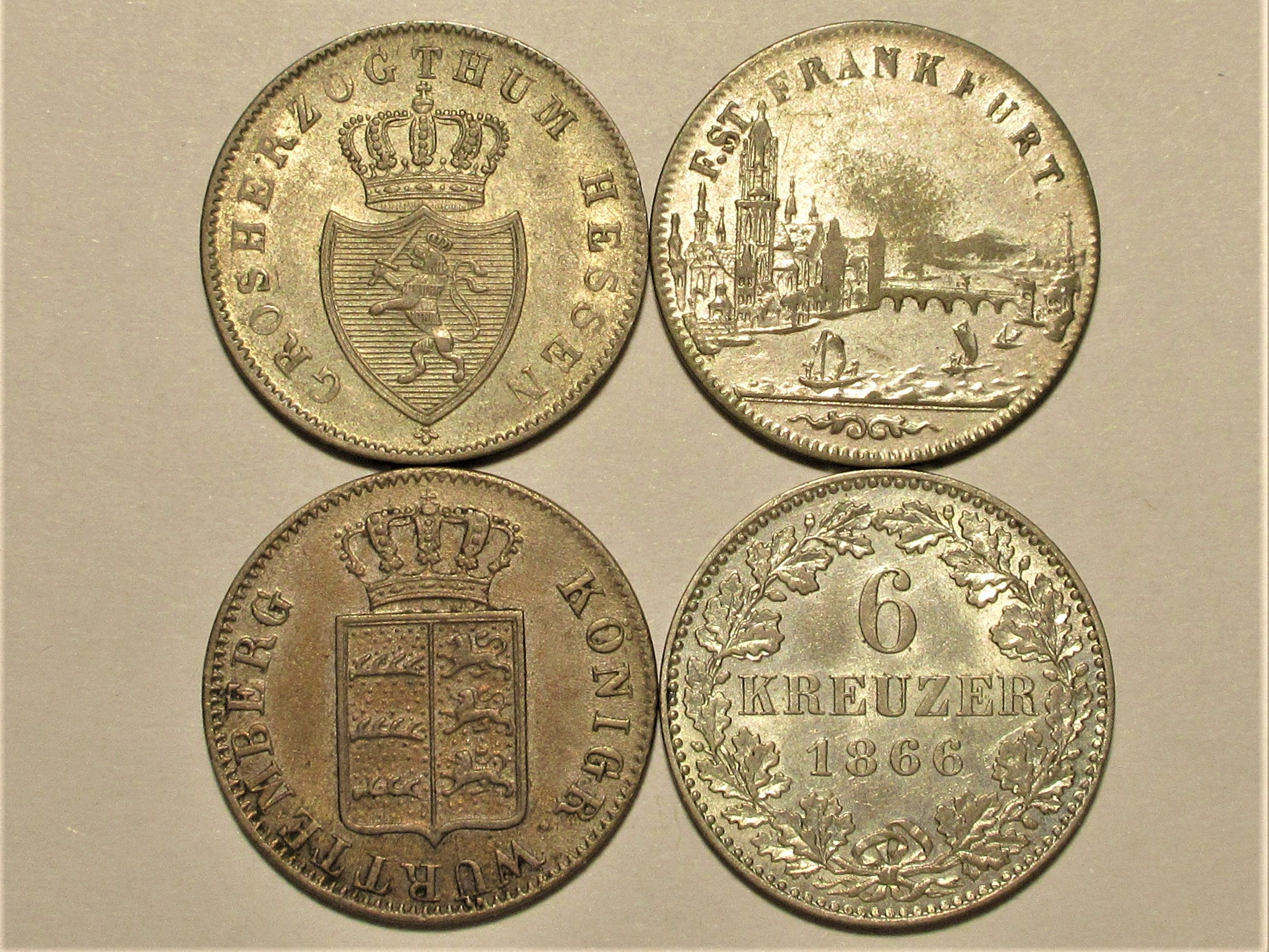 vier 6 Kreuzermünzen nach dem Münchner Vertrag, Rückseiten:Hessen-Darmstadt, Frankfurt, Württemberg; einheitliche Wertseite